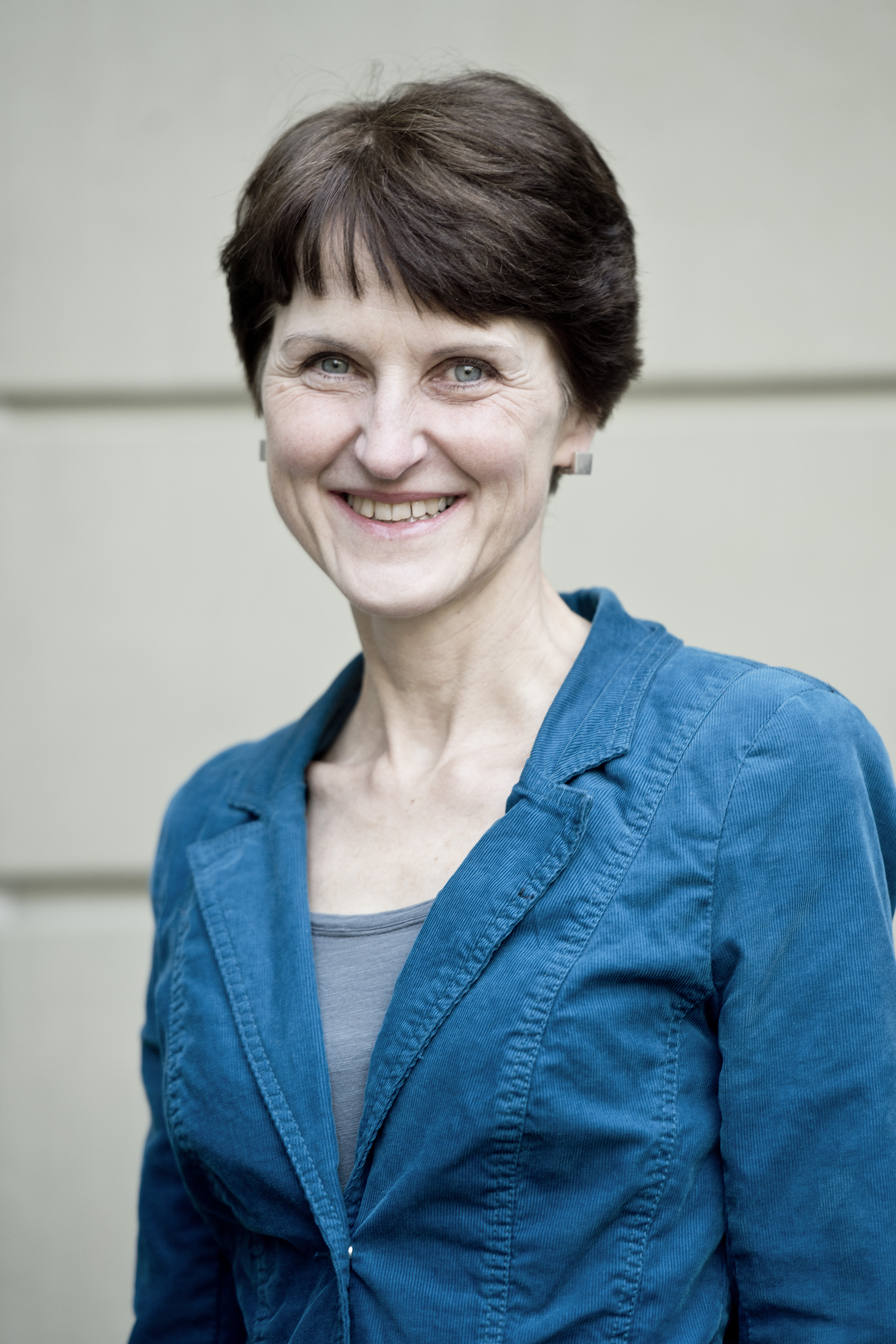 Franziska Teuscher, Mitglied der Berner Stadtregierung seit 2013. Offizielles Foto.